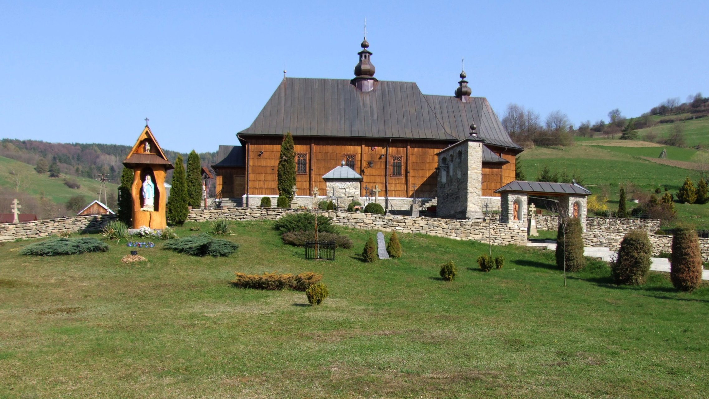 Kościół w Wierchomli Wielkiej (dawna cerkiew)